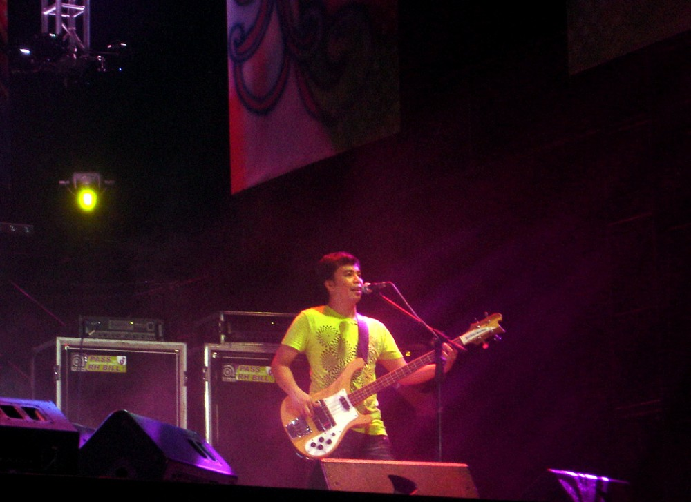 Filipino musician, Buddy Zabala